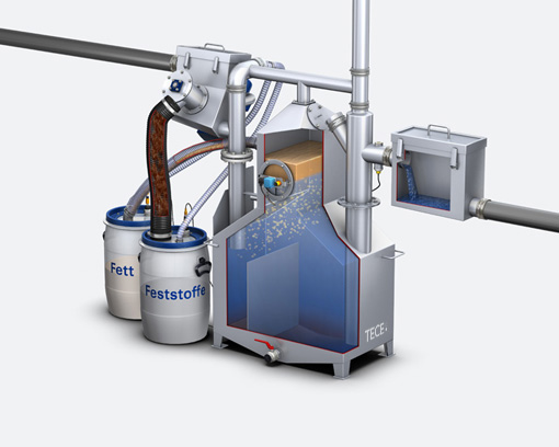 Schnitt durch einen Teil-Entsorger